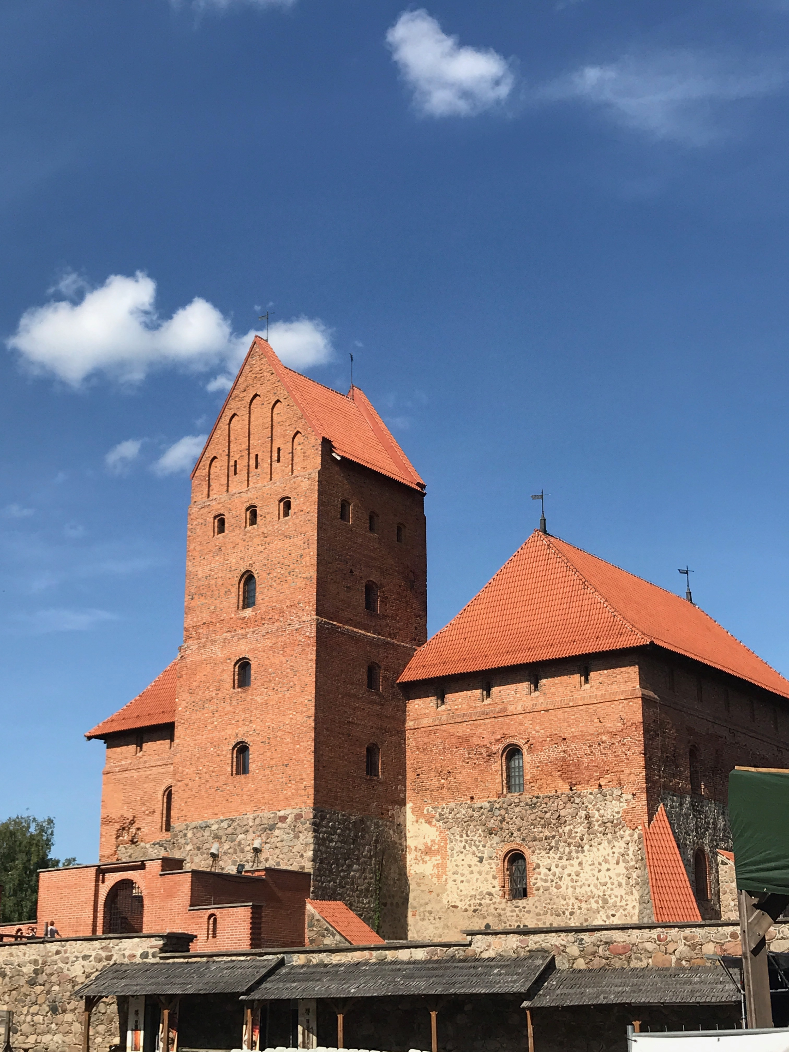 Тракайский замок